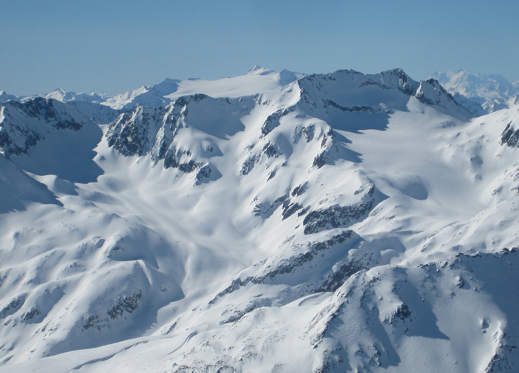 Pizzo Centrale vom Piz Badus